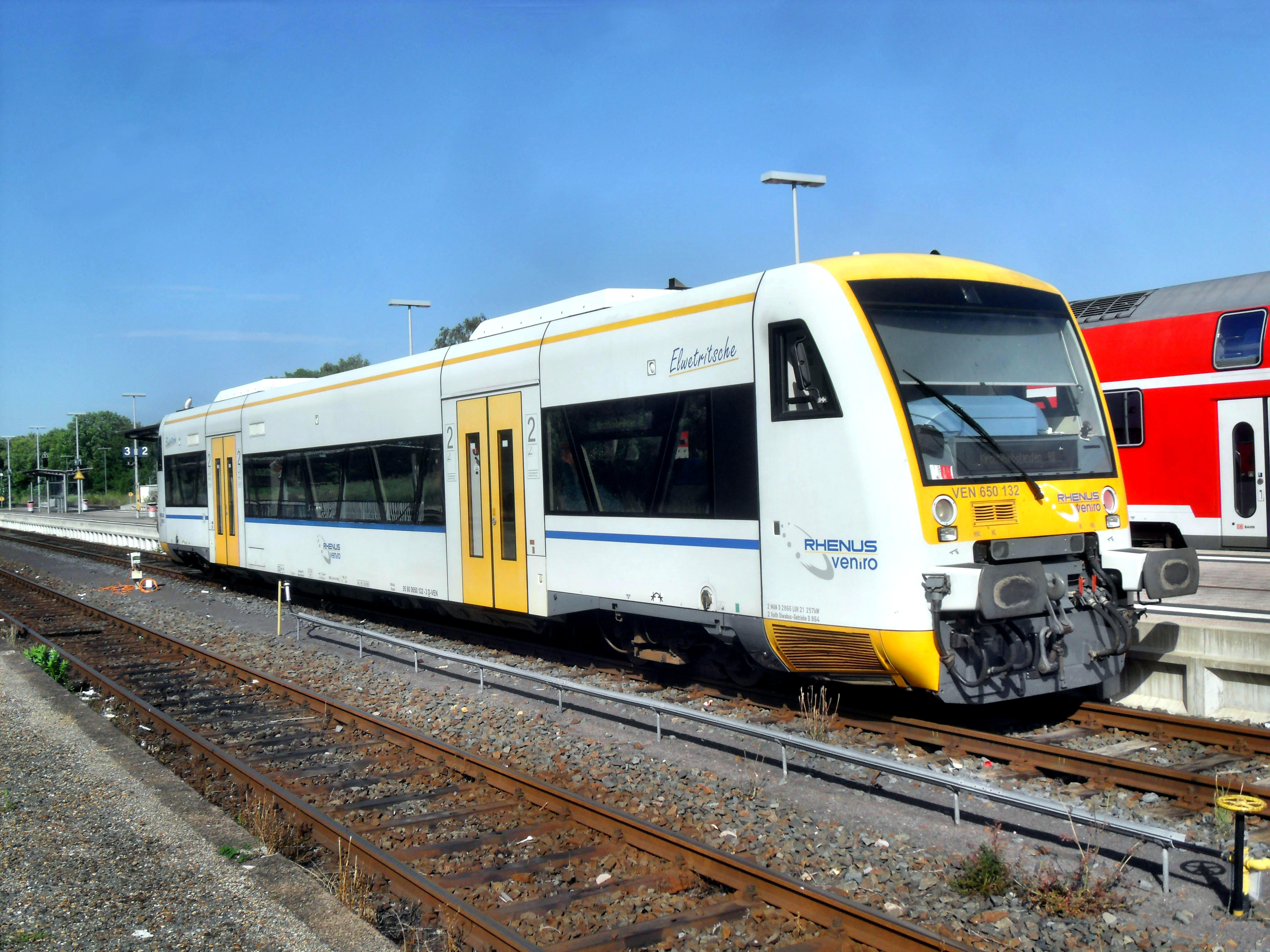 Stadler Regio-Shuttle RS1- VEN 650 132 Elwetritsche als Regionalbahn im Alzeyer Bahnhof auf dem Weg nach Kirchheimbolanden über die Donnersbergbahn (Rheinland-Pfalz, Deutschland)